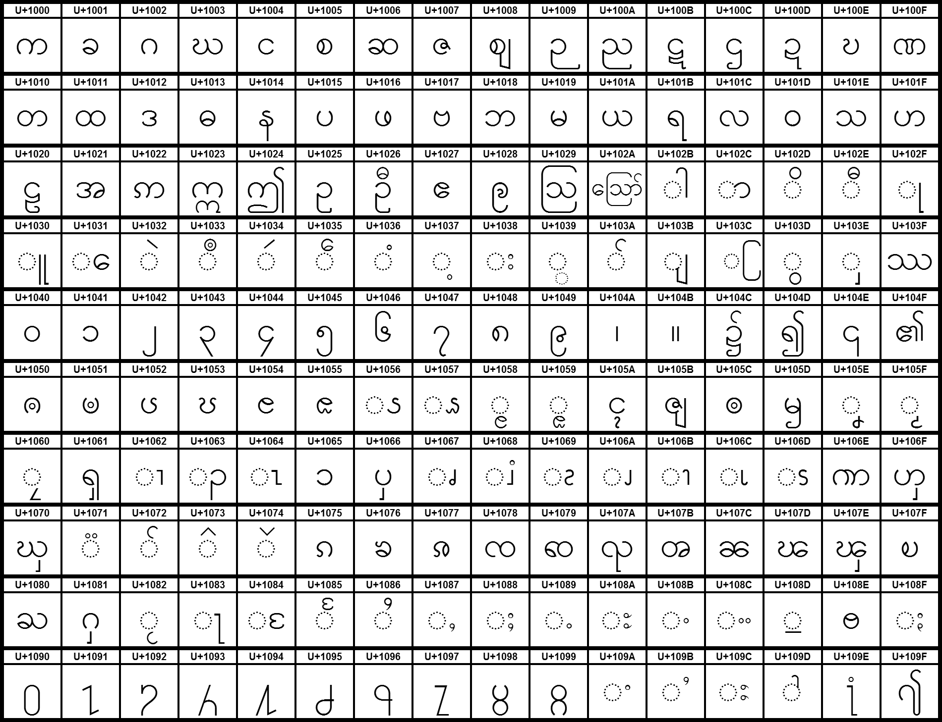 Grafiktafel für den Unicodeblock Birmanisch.